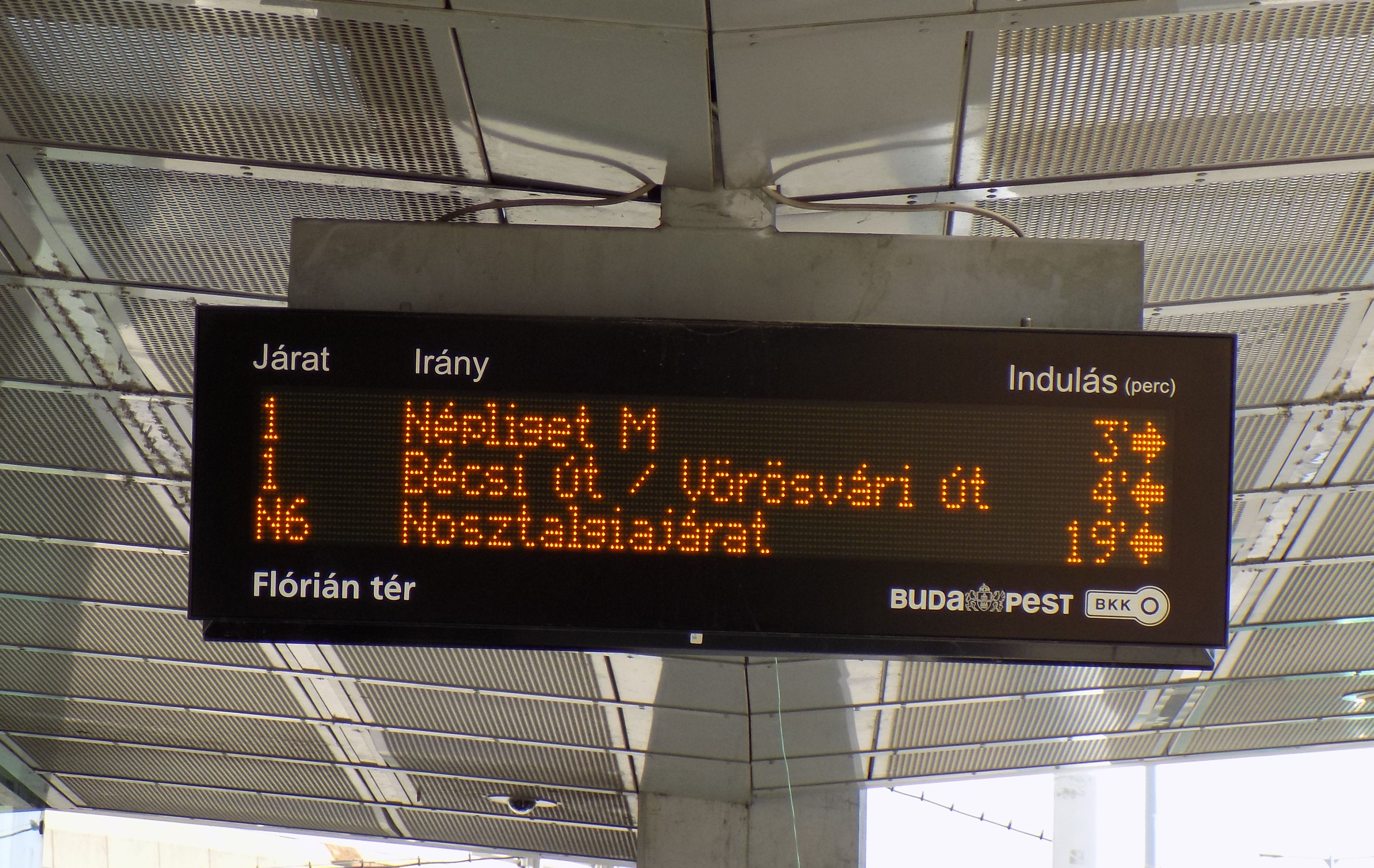 FUTÁR kijelző a Flórián téren az 1-es villamos megállójában